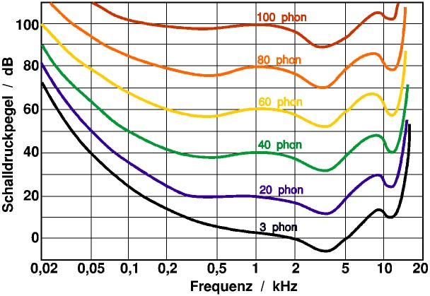 Kurven gleichen Lautstärkepegels (Isophonen)